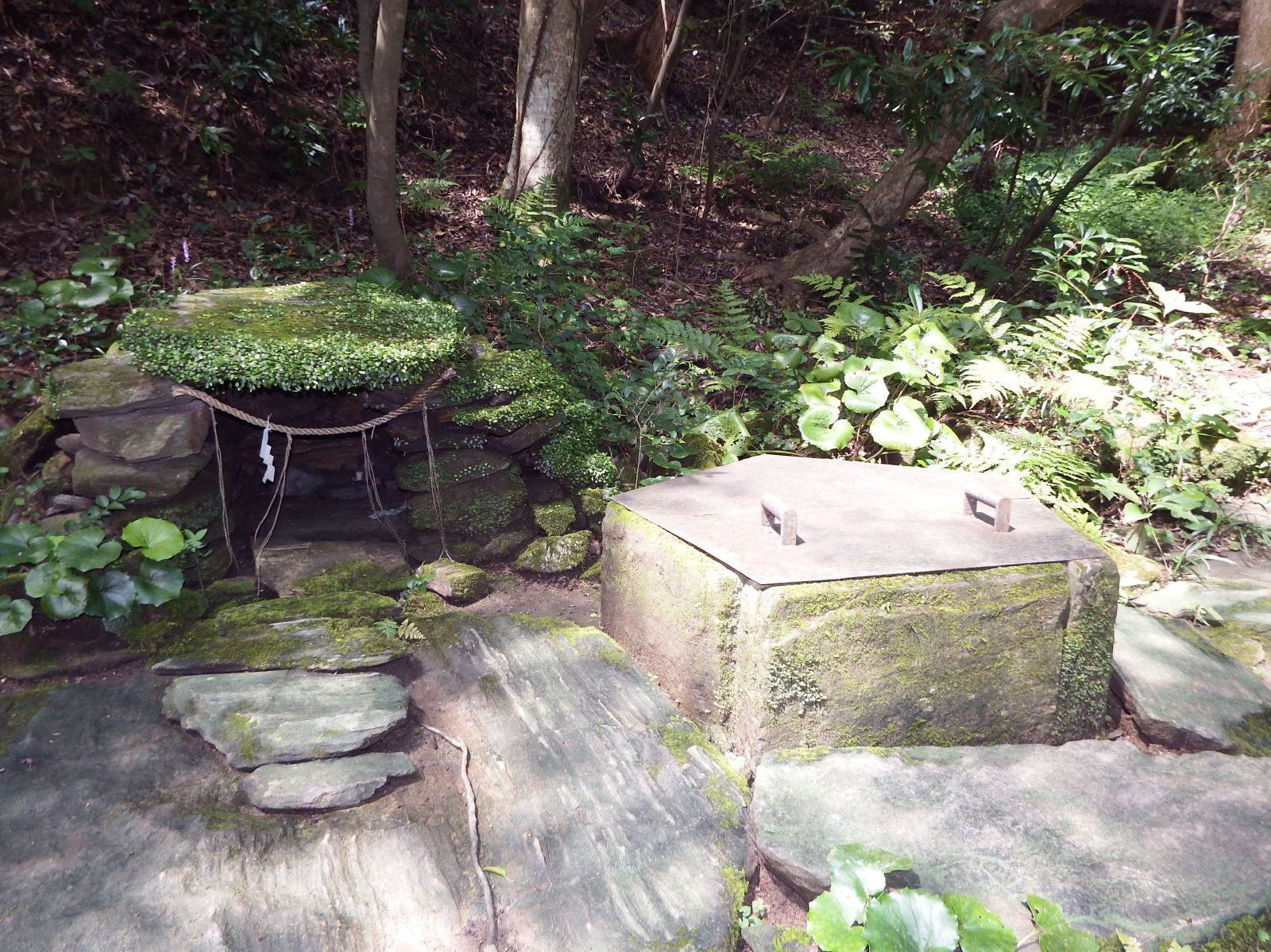 矢倉比売神社の摂社・大泉神社